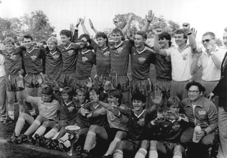 ADN-ZB-Tanjug-Tele-16.10.86-zin-SFRJ: 5. Europameisterschaft der Fußball-Junioren (Unter 19 Jahre). Nach 3:1-Finalerfolg Titel für DDR-Elf. Die Fußball-Junioren der DDR (unter 19 Jahre) errangen am 15.10.85 in Subotioa durch einen 3:1-Finalsieg gegen Italien nach 1965 und 1970 zum dritten Mal den Titel in dieser Nachwuchskategorie. Spieler und Betreuer stellten sich nach dem Endspiel überglücklich den Fotografen.